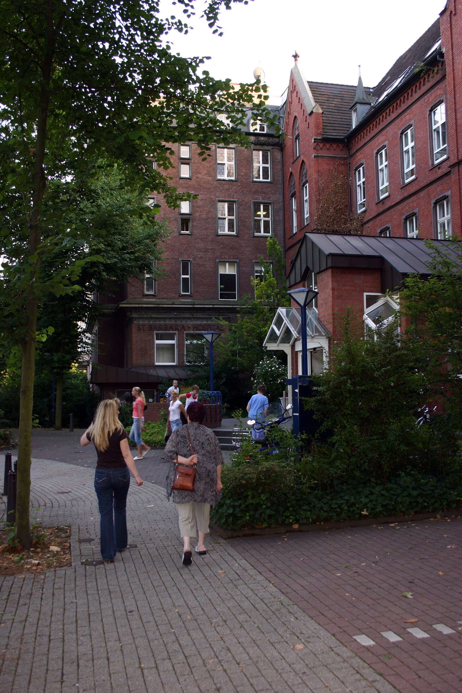 Haupteingang vom St. Barbara-Hospital in Duisburg an der Barbarastraße, Ecke Schroerstraße.